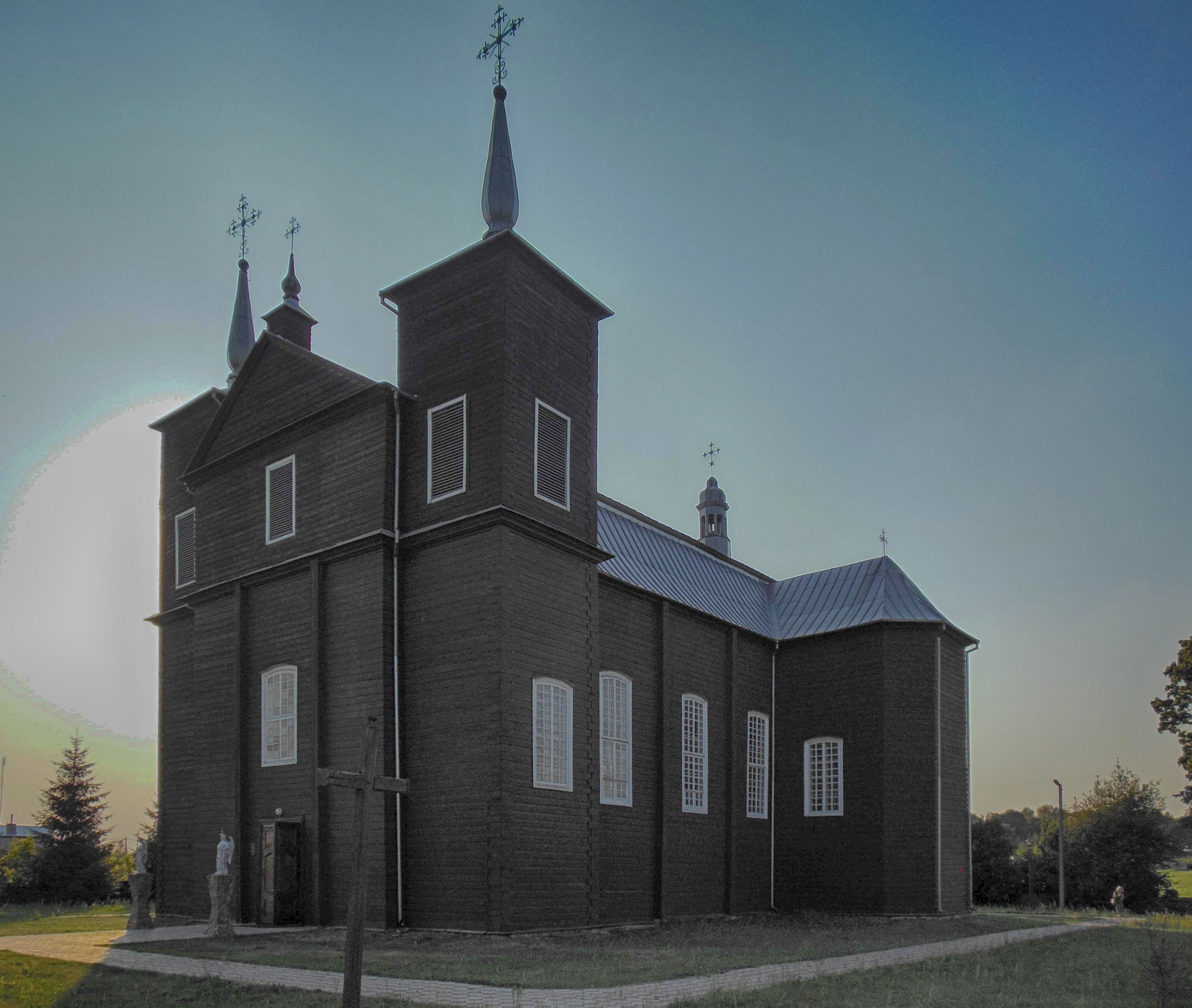 Беларуская (тарашкевіца): Касьцёл Яна Хрысьціцеля галоўны і бакавы алтары. в. Воўпа This is a photo of Belarusian heritage monument. Reference number: 412Г000093 ( WLM)